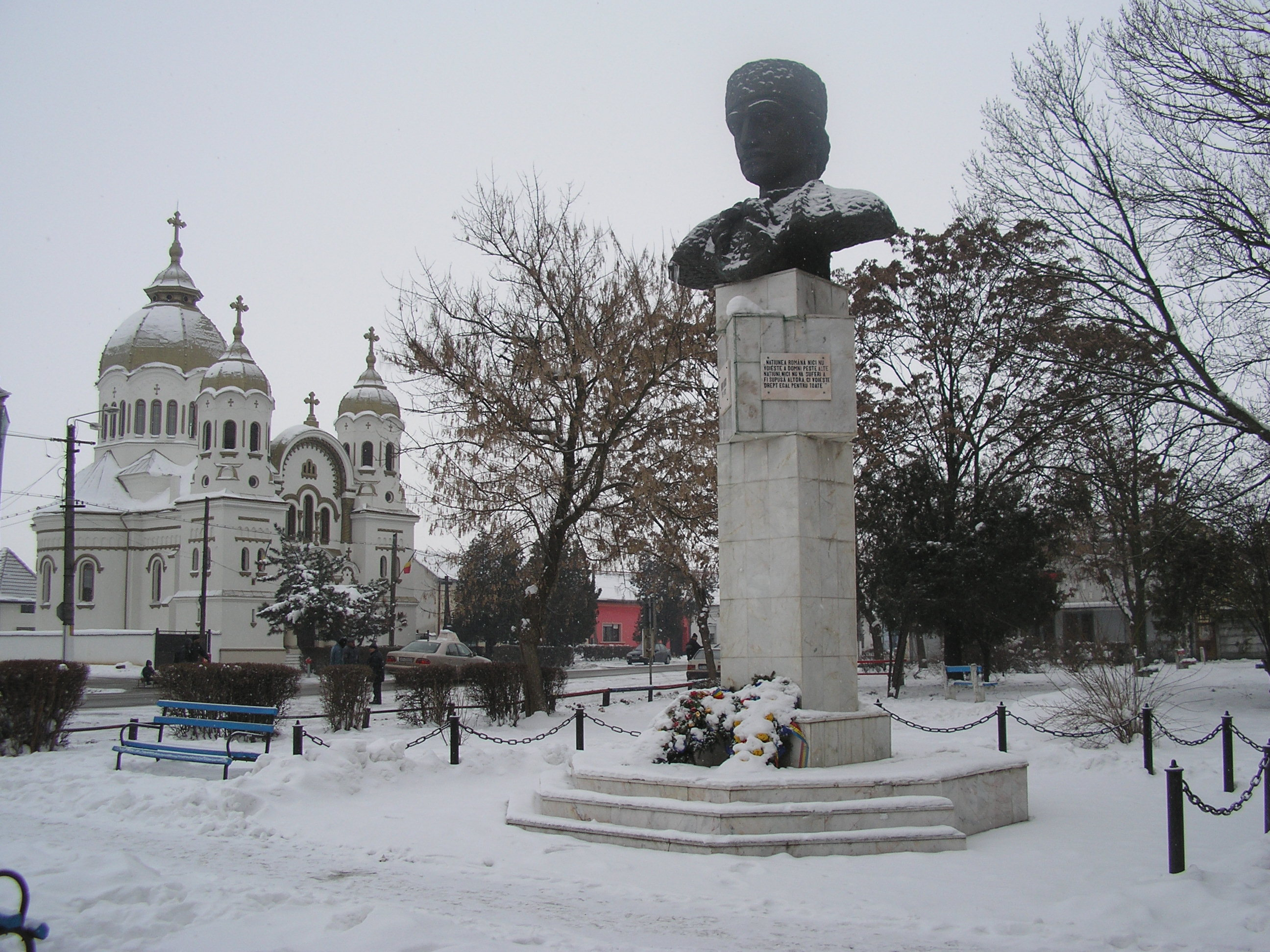 Parcul salontanAvram Iancu by Cornel Durgheu, 2003 bronze bust - Nagyszalonta (Salonta), Strada Republicii [1]